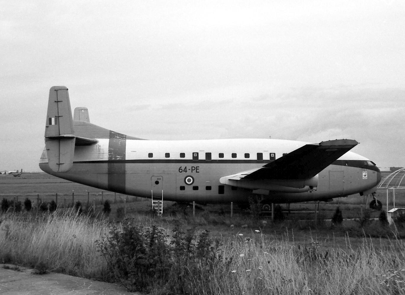 seen at Aeroclub de L' Eure Evreux France